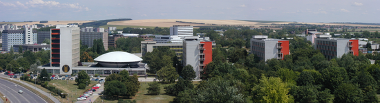 Panoramatický pohľad na areál SPU v Nitre